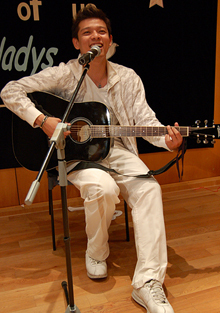 Hady Mirza semasa persembahan untuk HapyHadys Fanclub.